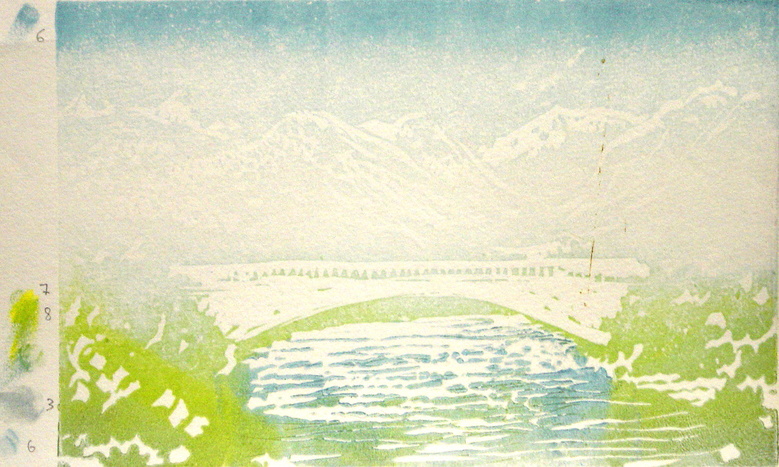 Linocut - plate number 1